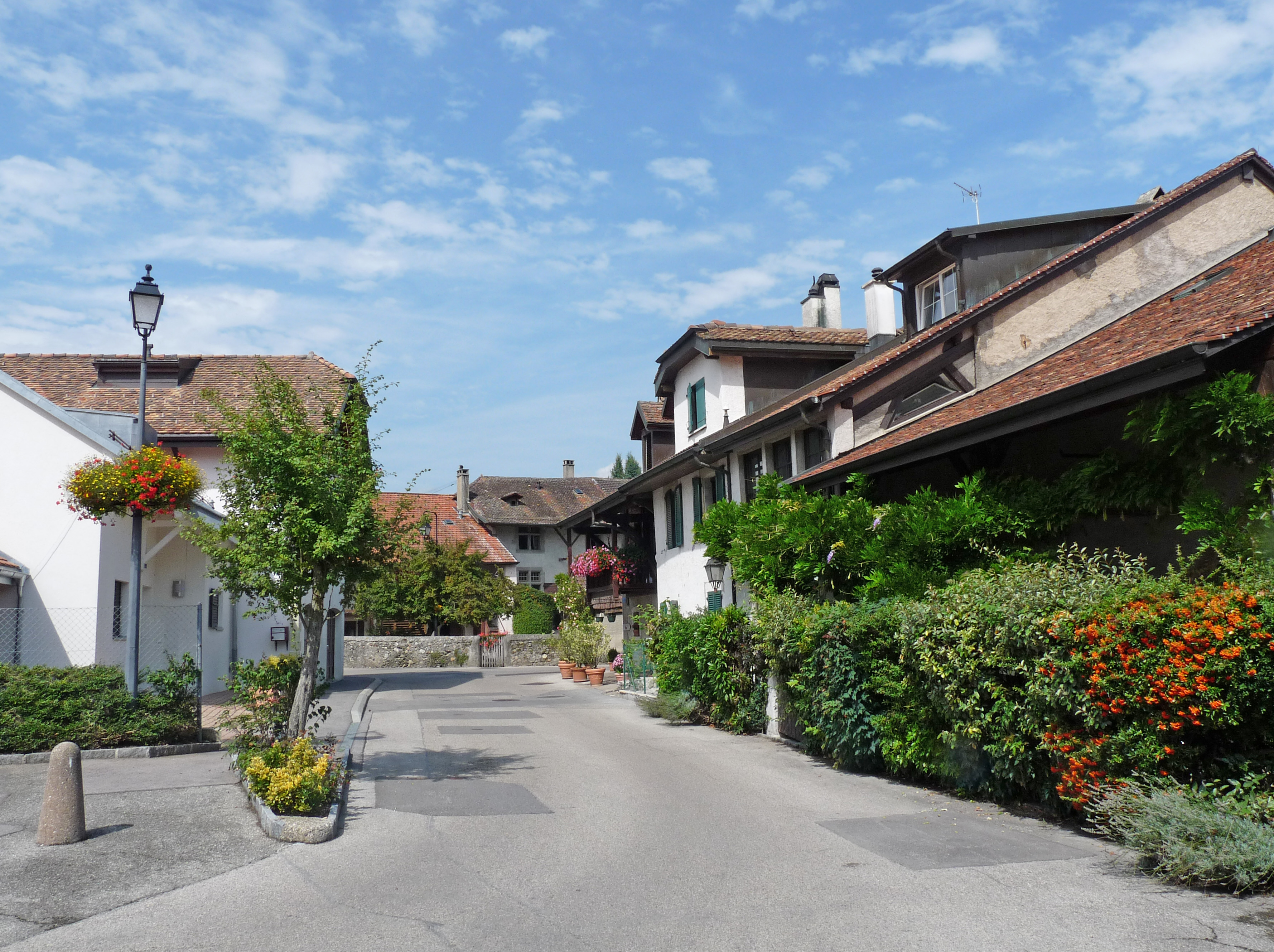 Une rue de Commugny (canton de Vaud, Suisse)